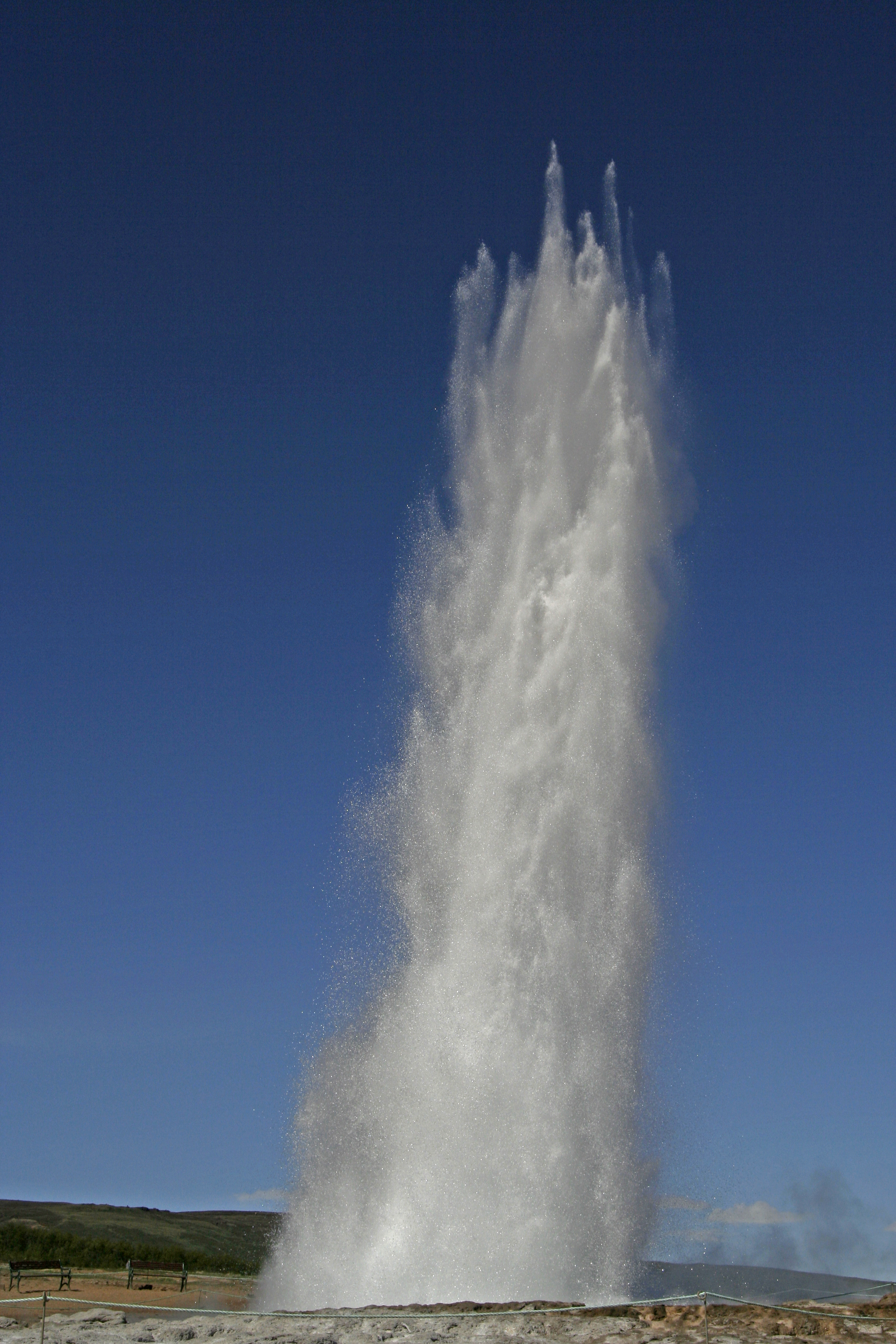 Stokkur Iceland, Torsten Mühlbacher